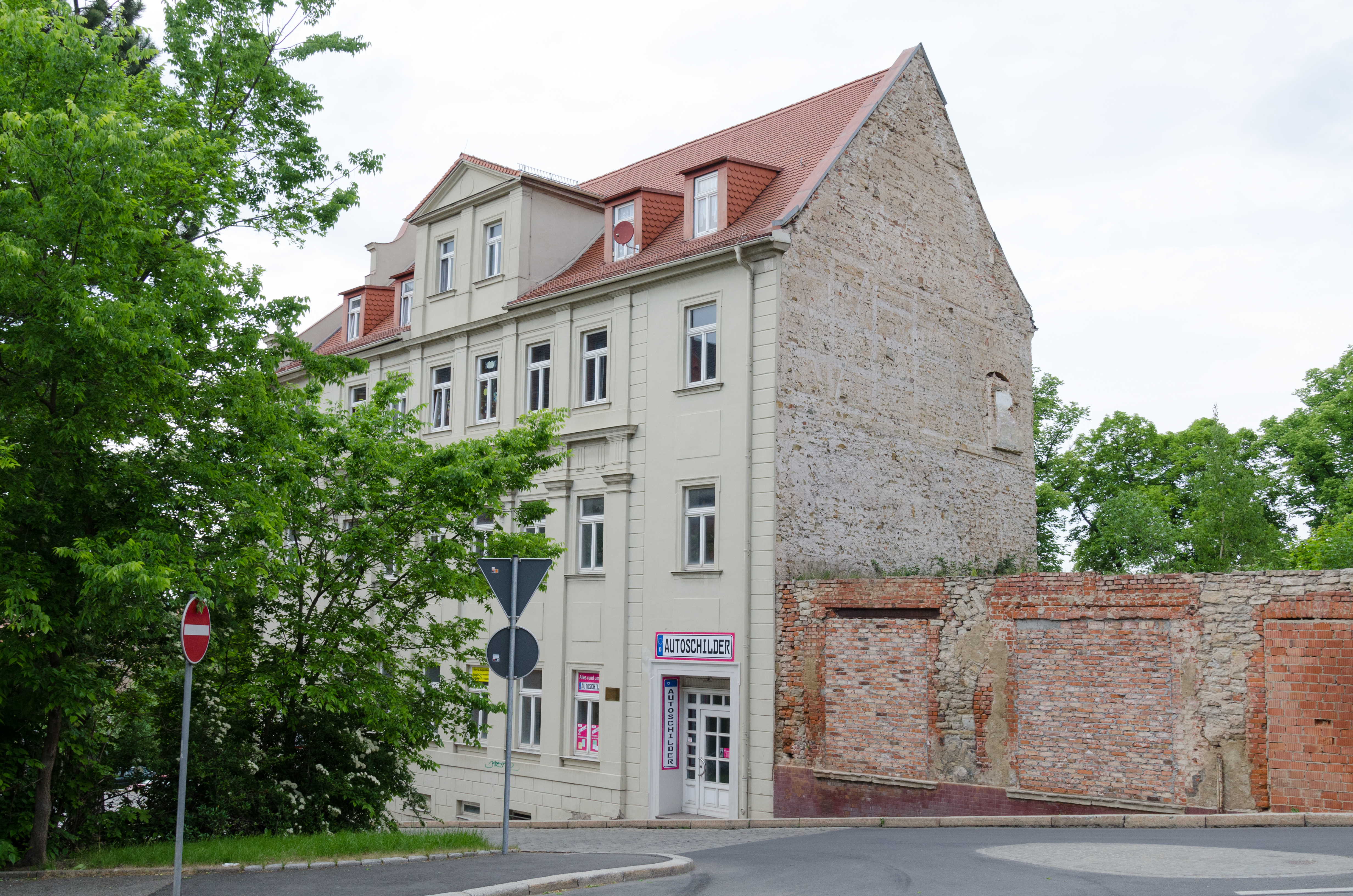 Zeitz, Nicolaiplatz 6, Südseite